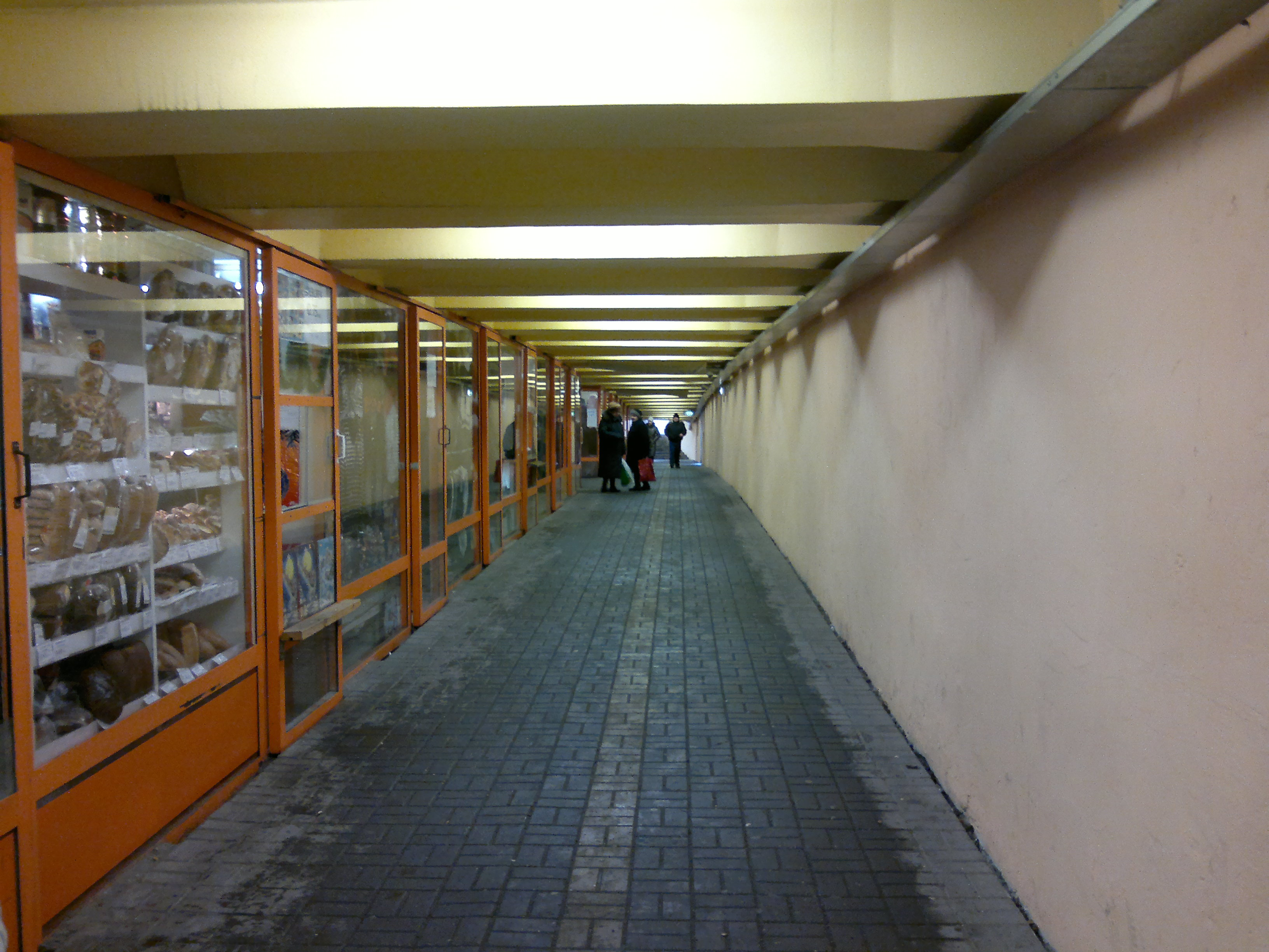 Mustakivi tunnel